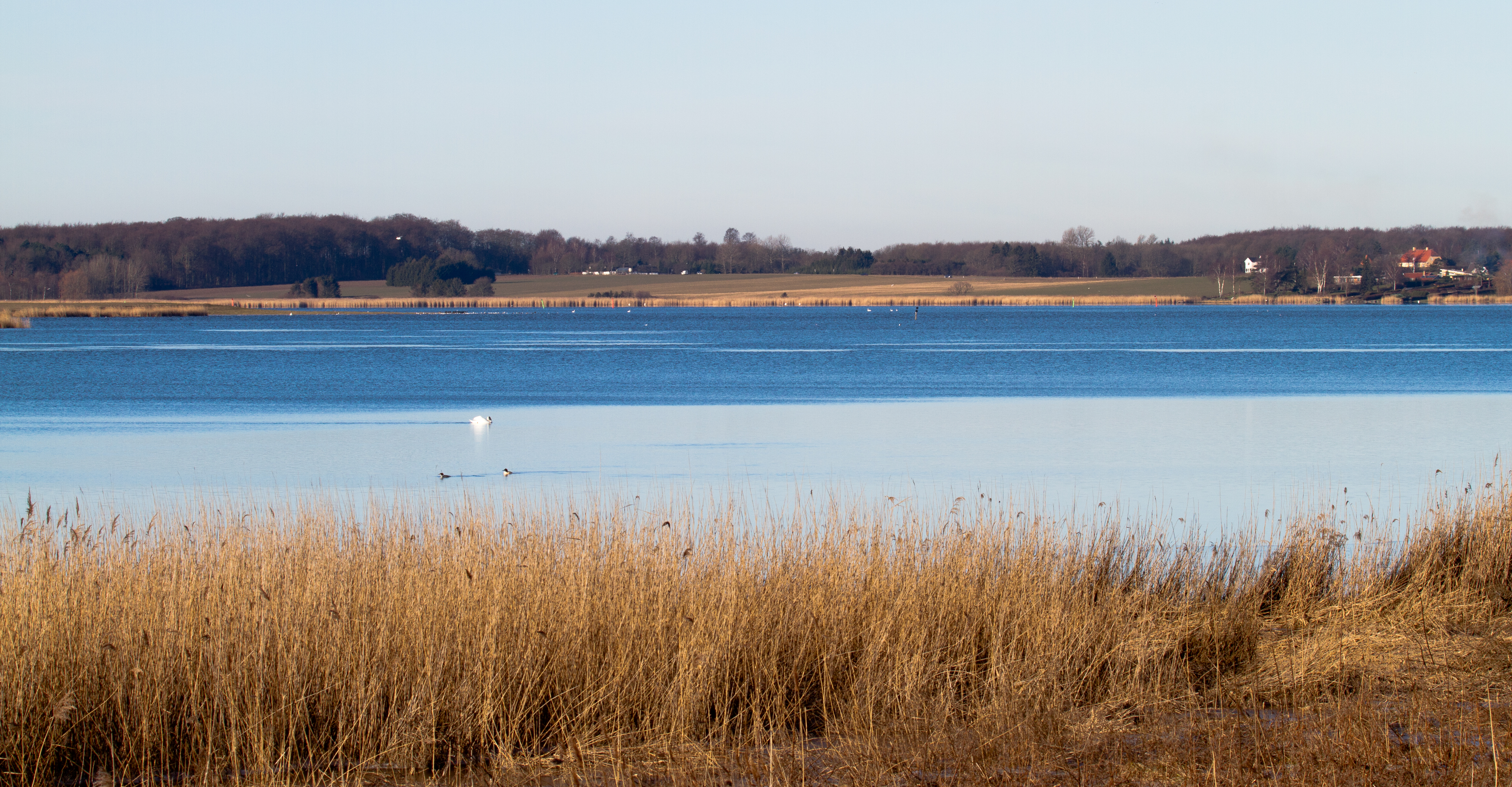 Gavnø seen from Zealand